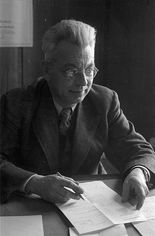 Original image description from the Deutsche Fotothek Aufnahmen von M. Friedrichs, M. Fischer, Hermann Matern, Arno Schellenberg und Frau, Frau Gret Palucca, Erich Ponto, Prof. Joseph Keilberth, Otto FalvayKurt Fischer, stellvertretender Ministerpräsident des Landes Sachsen um 1950